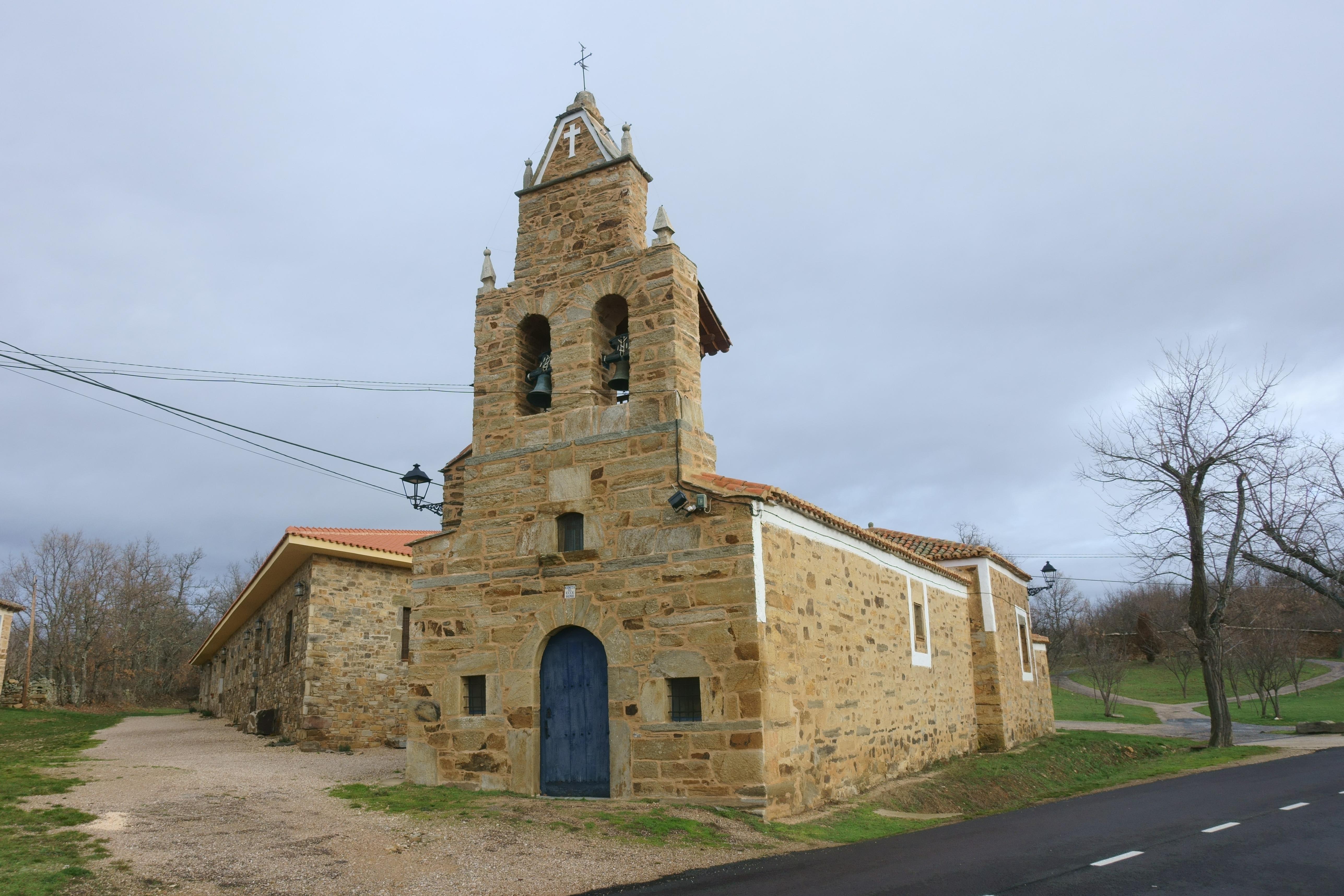 Ermita del Ecce Homo, Santa Colomba de Somoza (León, España).